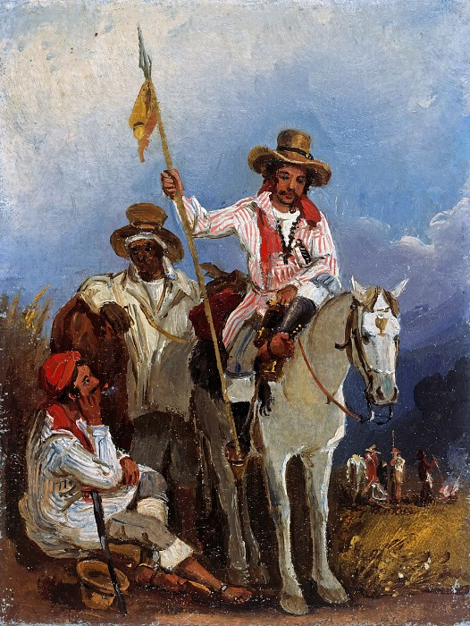 Ferdinand Bellermann, llaneros, 1843